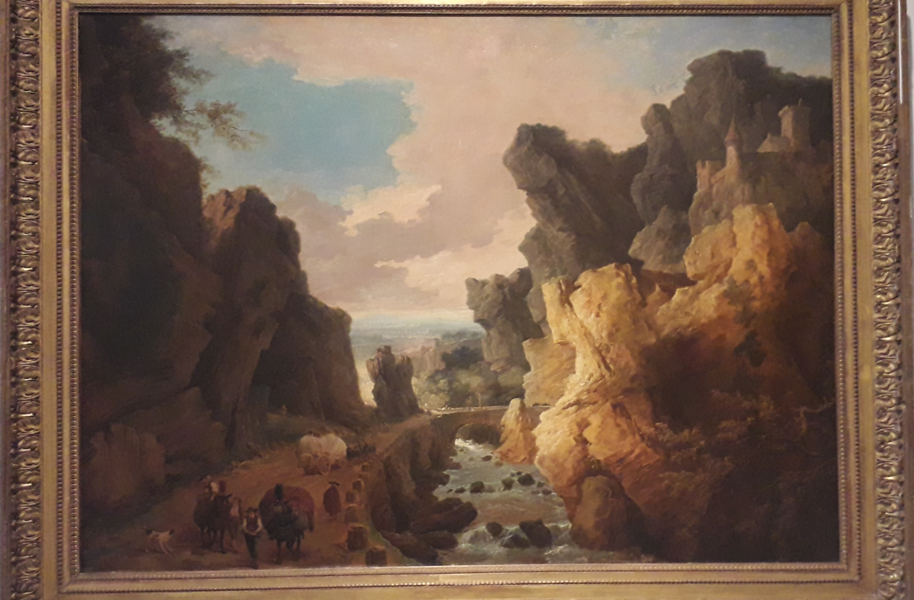 Les gorges d'Ollioles, Hubert Robert, 1783, Musée des beaux-arts de Nice